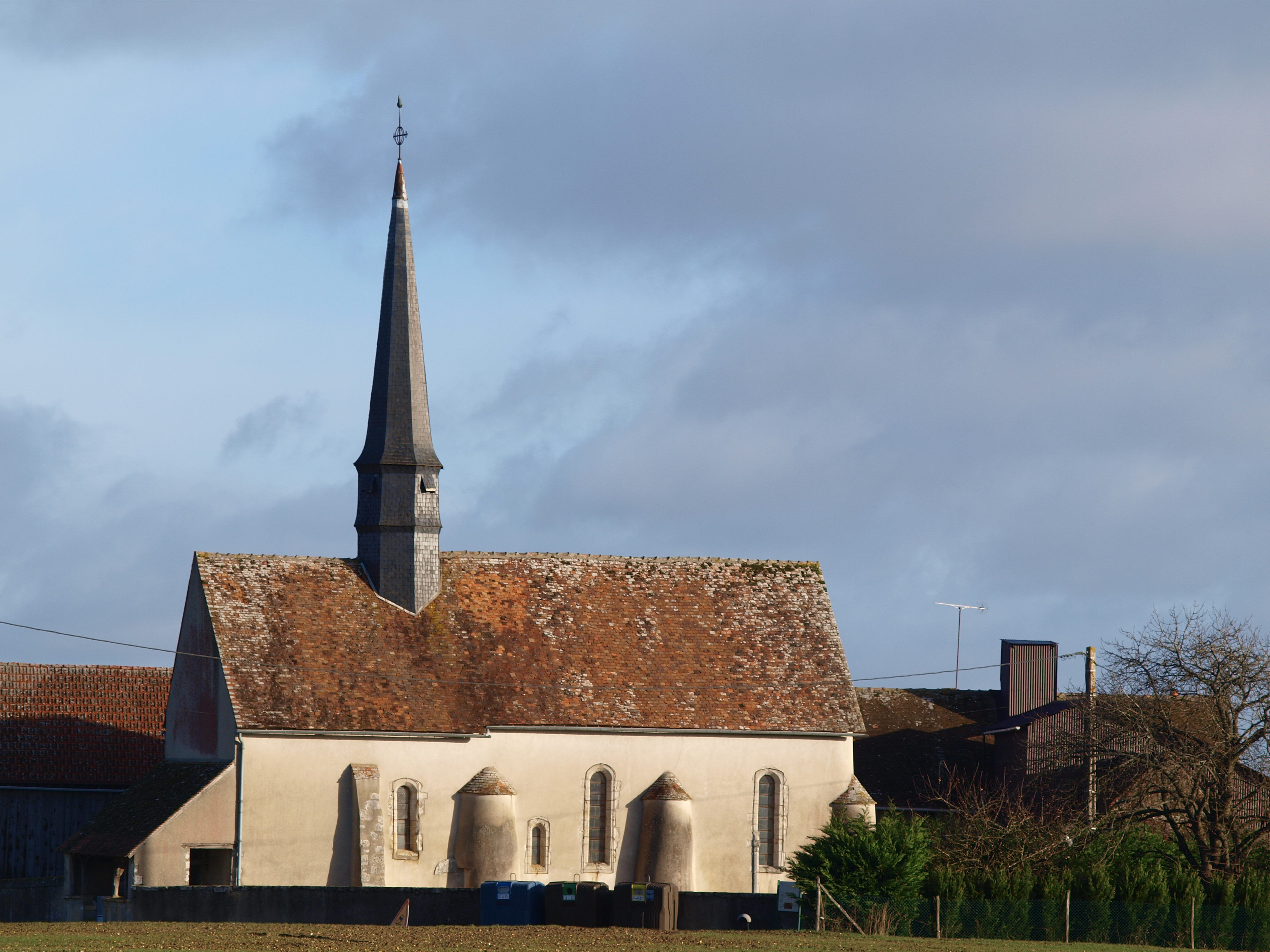 Thorailles (Loiret, France)